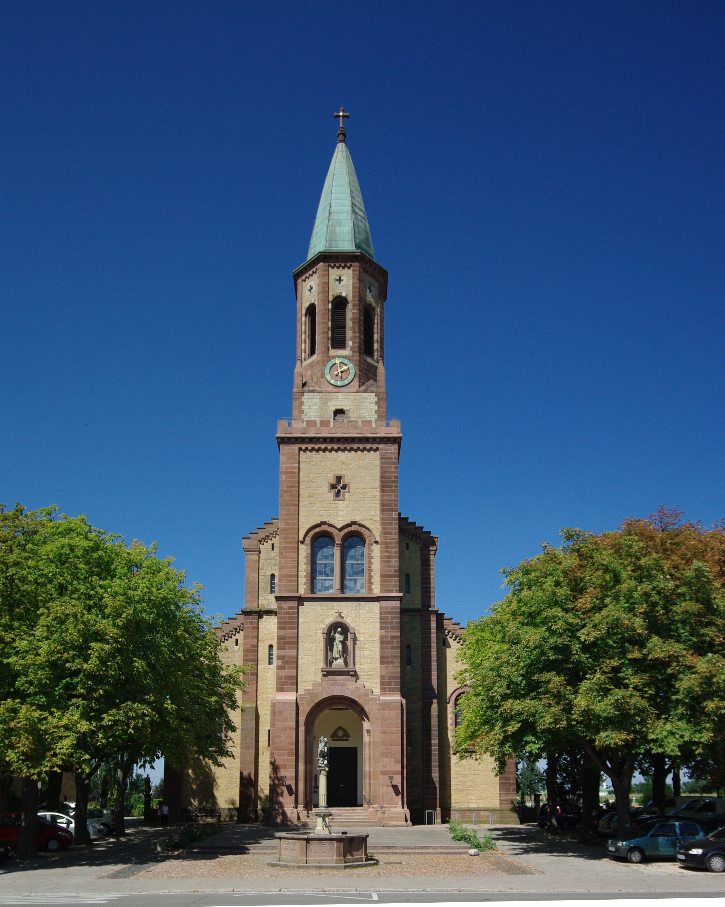 St. Georg